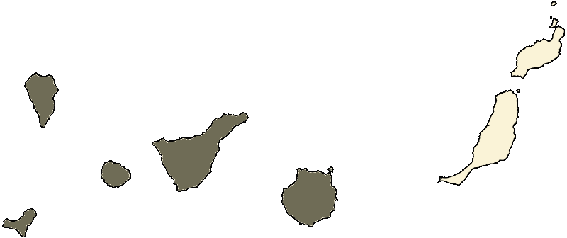 Mapa de Canarias resaltando las islas occidentales y Gran Canaria